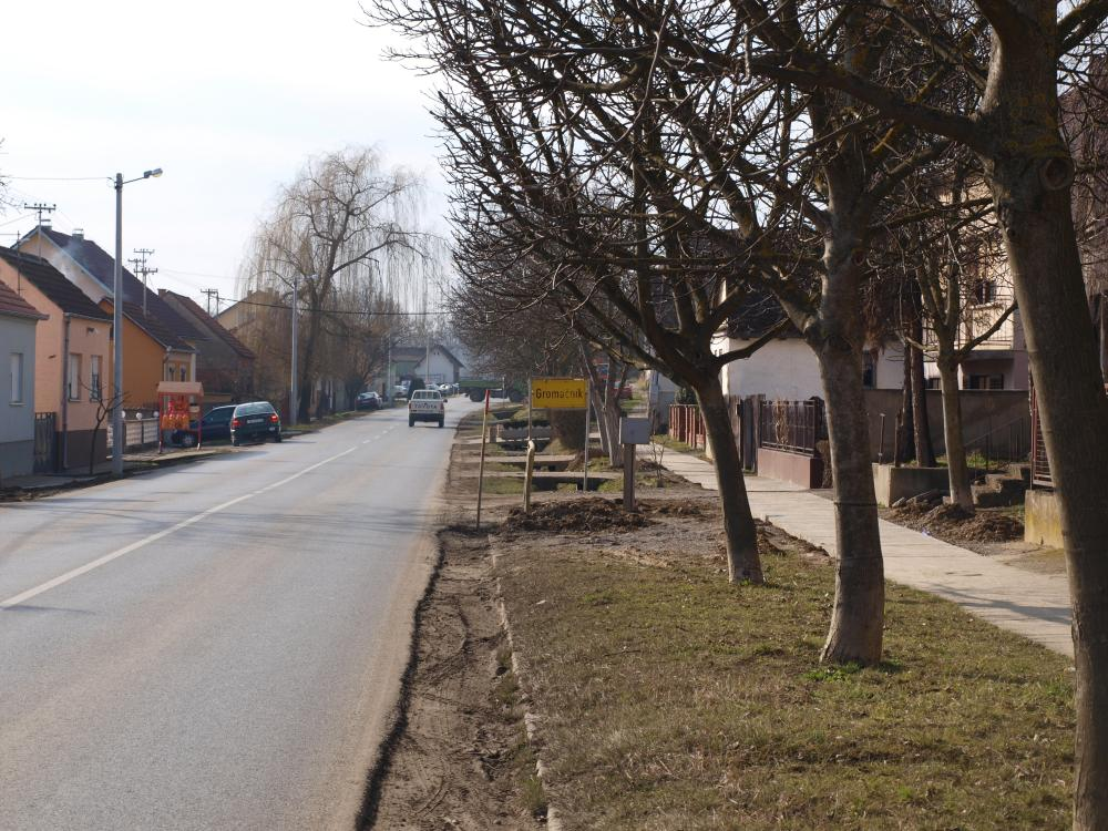 Ulaz u selo Gromačnik, Brodsko-posavska županija.